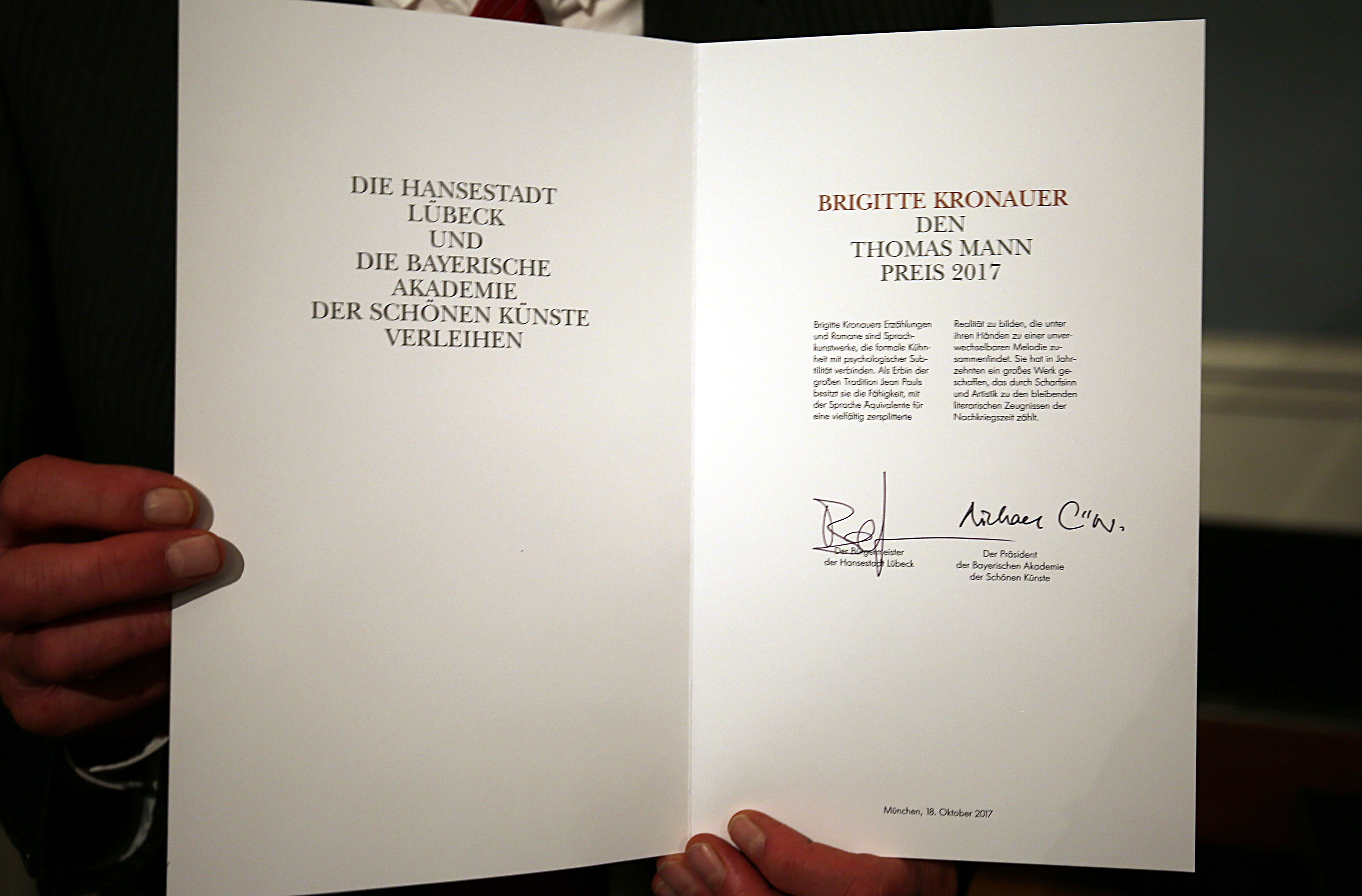 Verleihung des Thomas-Mann-Preis_2017 der Hansestadt Lübeck und der Bayerischen Akademie der Schönen Künste an Brigitte Kronauer. 18. Oktober 2017 in der Münchner Residenz.